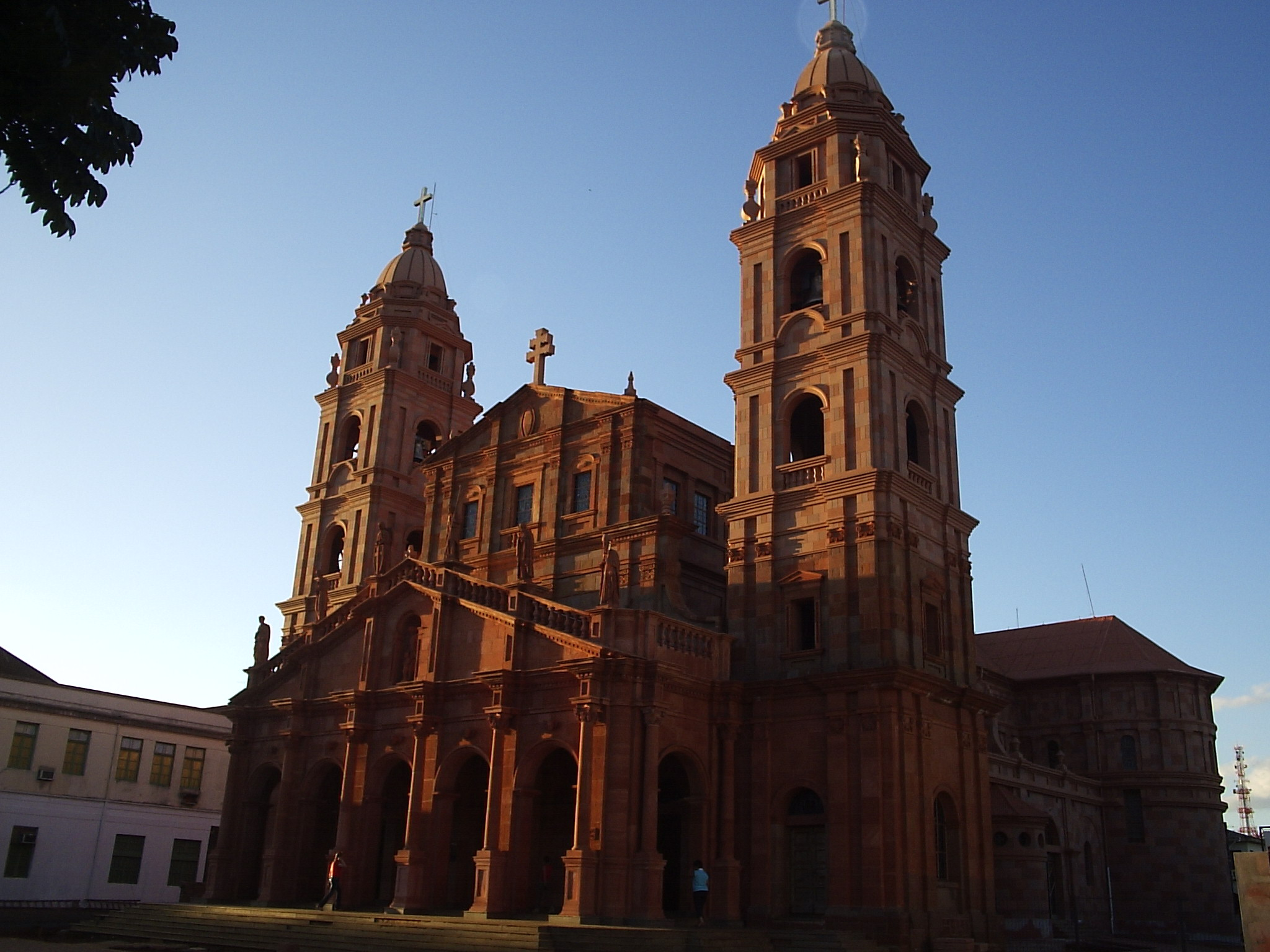 Vista da Catedral Angelopolitana, monumento turístico do município de Santo Ângelo, Rio Grande do Sul, Brasil